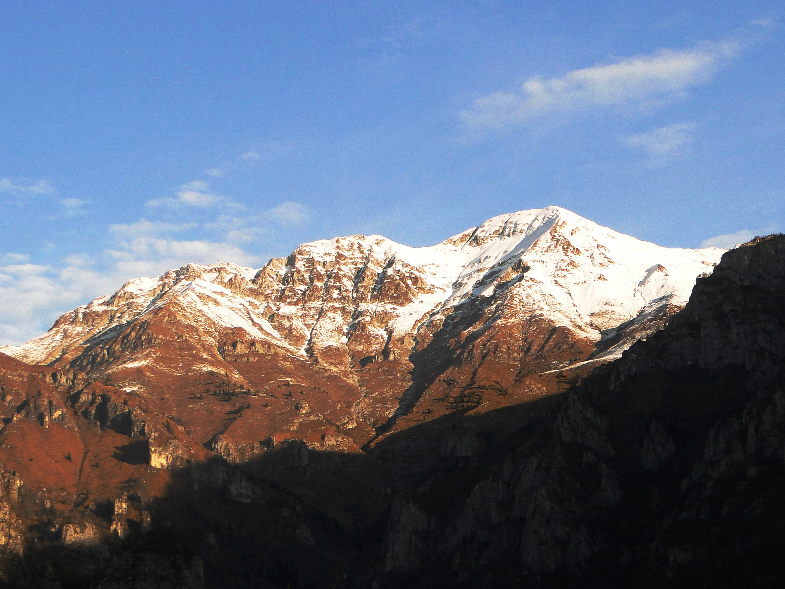 La Cima di Fop vista dalla val Dossana, val Seriana. Prealpi bergamasche (BG)